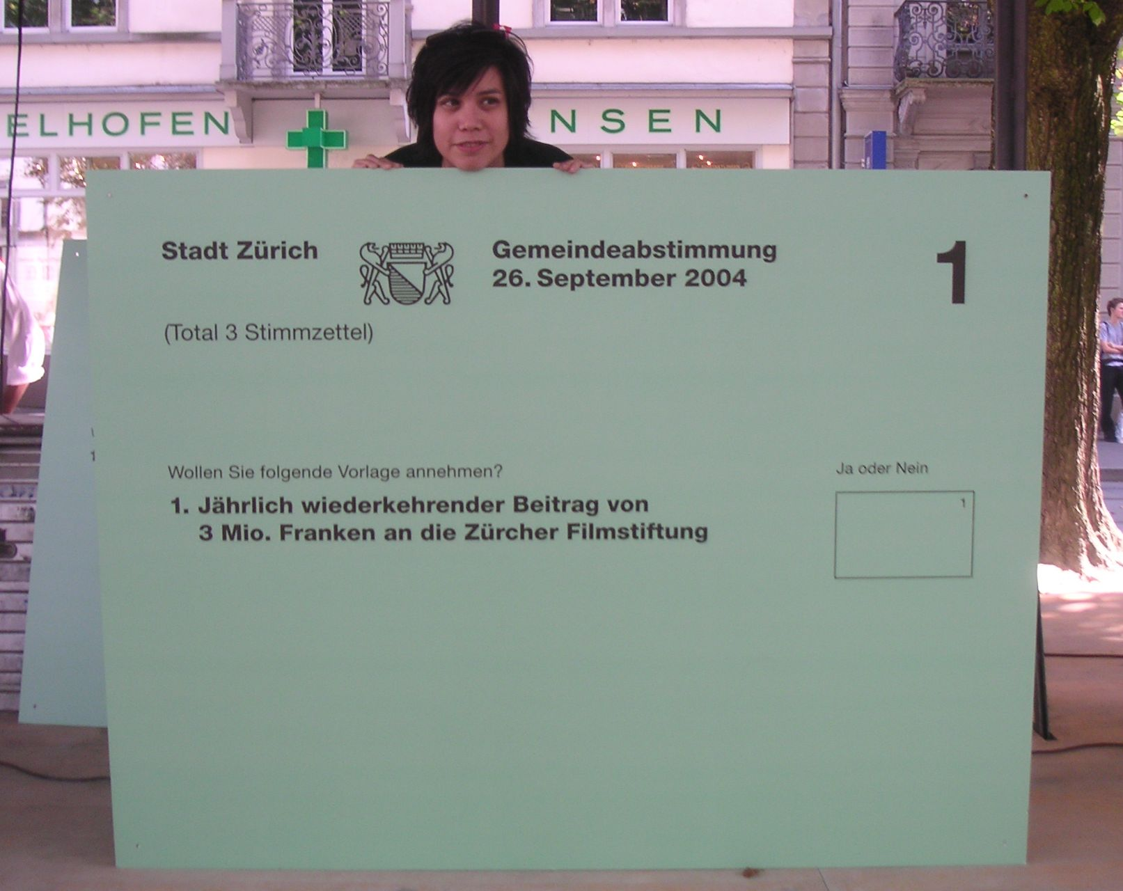 SP-Politikerin Min Li Marti auf dem Stadelhofen-Platz in Zürich mit einem vergrösserten Abstimmungszettel. Min Li Marti arbeitete in der Kampagne für eine Filmstiftung. Die Idee war, dass Passanten sich mit Filmprominenten hinter dem Stimmzettel ablichten lassen konnten, wobei das Kästchen dann noch mit dem Ja zugusten einer Zürcher Filmstiftung ausgefüllt wurde.